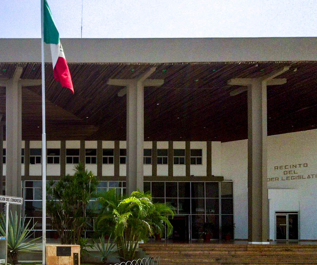 Sede del Congreso del Estado de Yucatan, denominada:Recinto del Poder Legislativo.